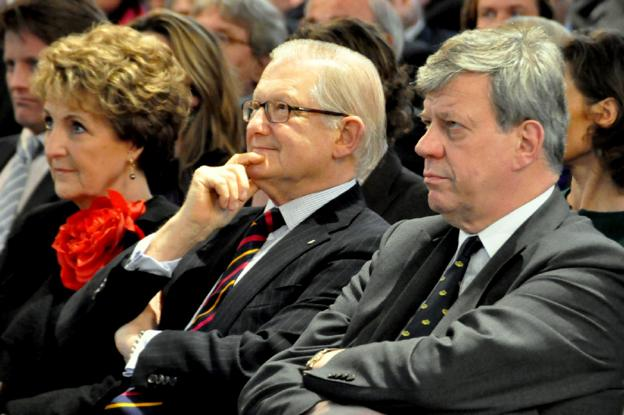 Afscheid mr. Pieter van Vollenhoven als voorzitter van de Onderzoeksraad voor Veiligheid; samen met zijn echtgenote prinses Margriet en minister Ivo Opstelten